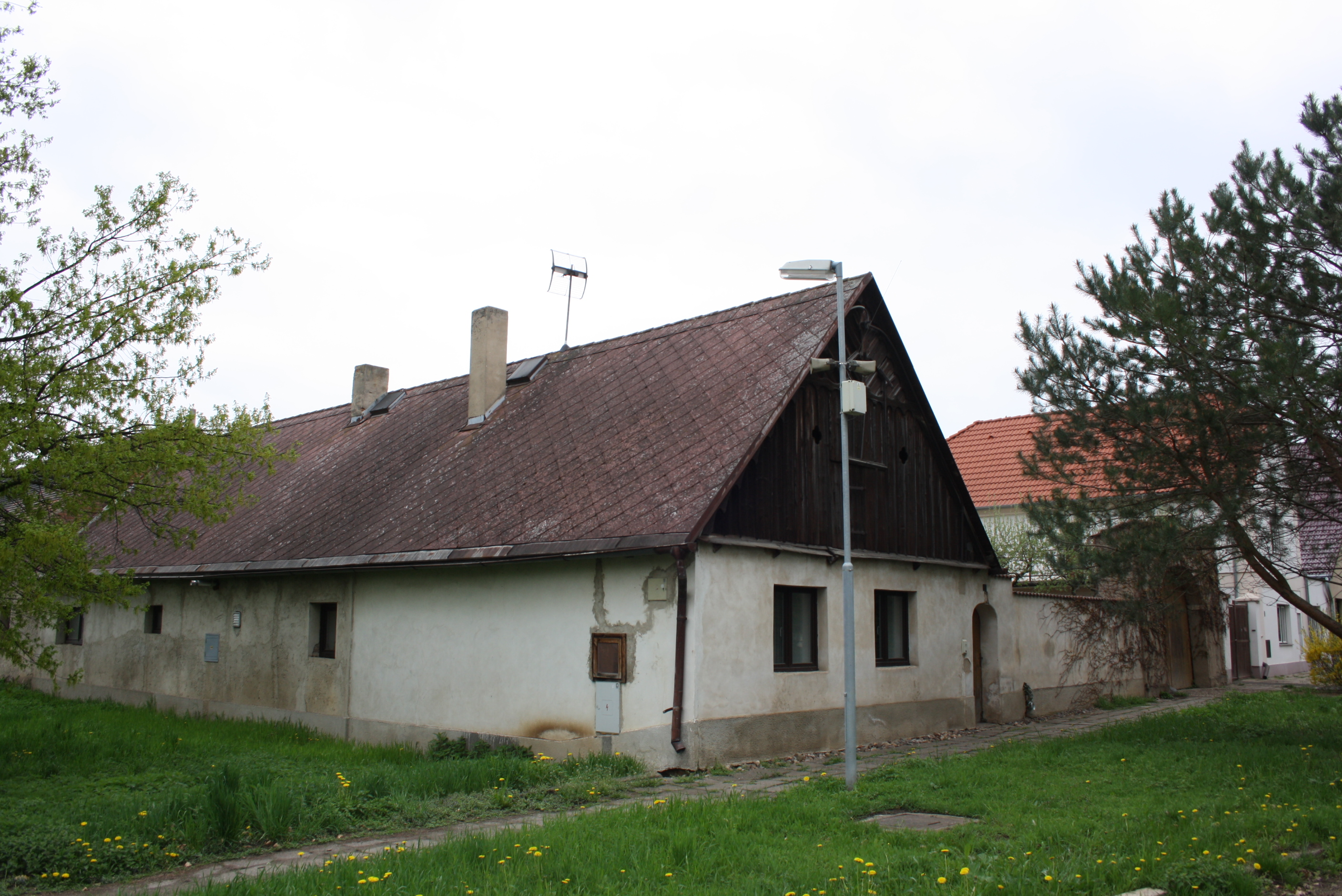 Památkově chráněný dům číslo popisné 6 v Nových Kopistech.